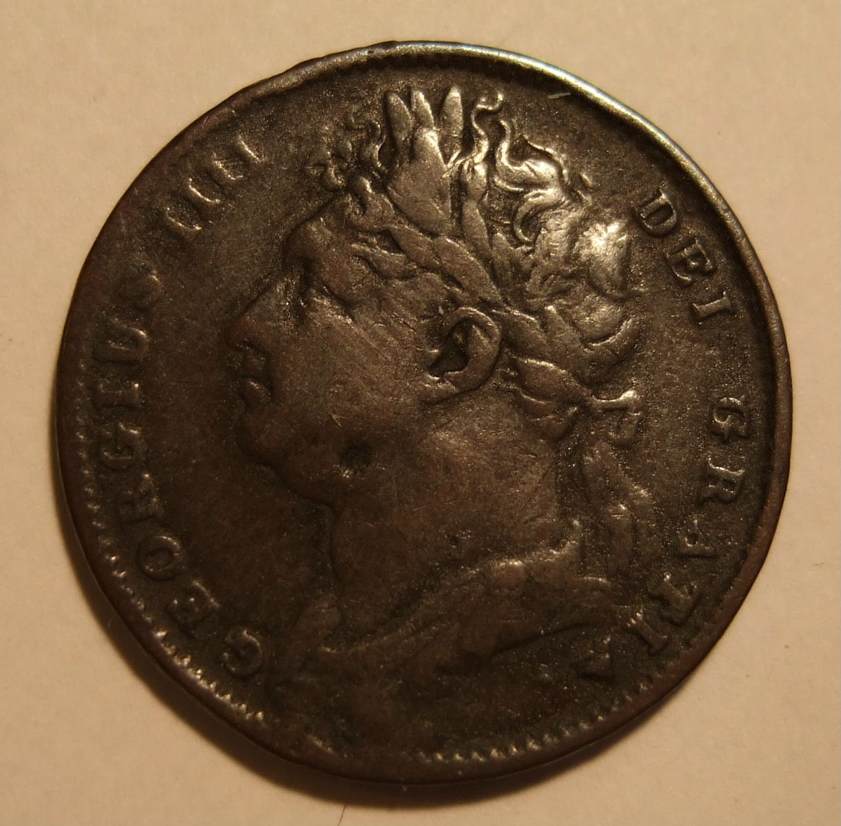 GREAT BRITAIN, GEORGE IV 1822 ---FARTHING b